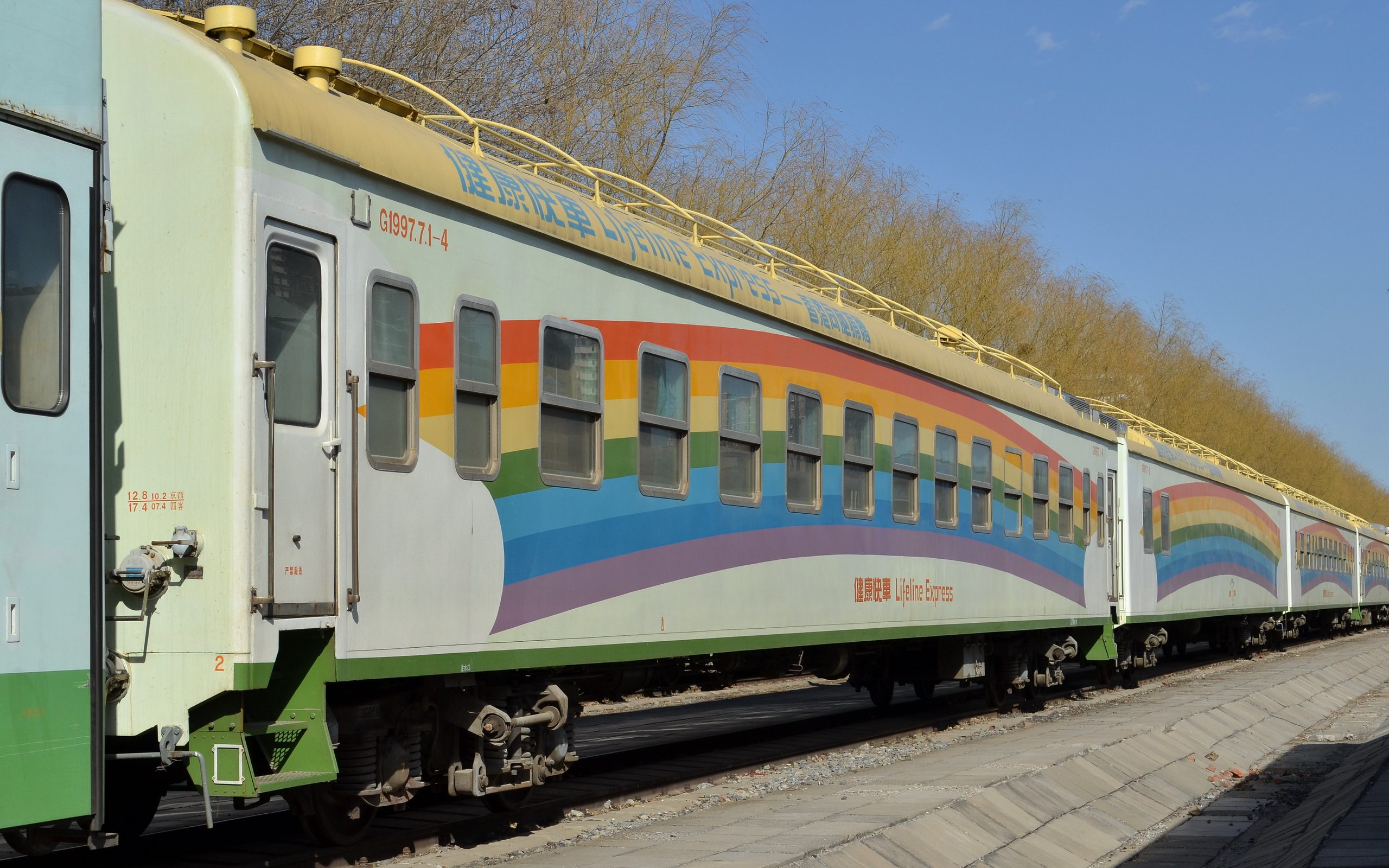 1997年7月1日开始投入服务的第一列健康快车